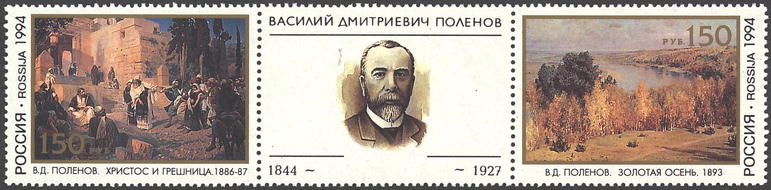 Почтовая марка России